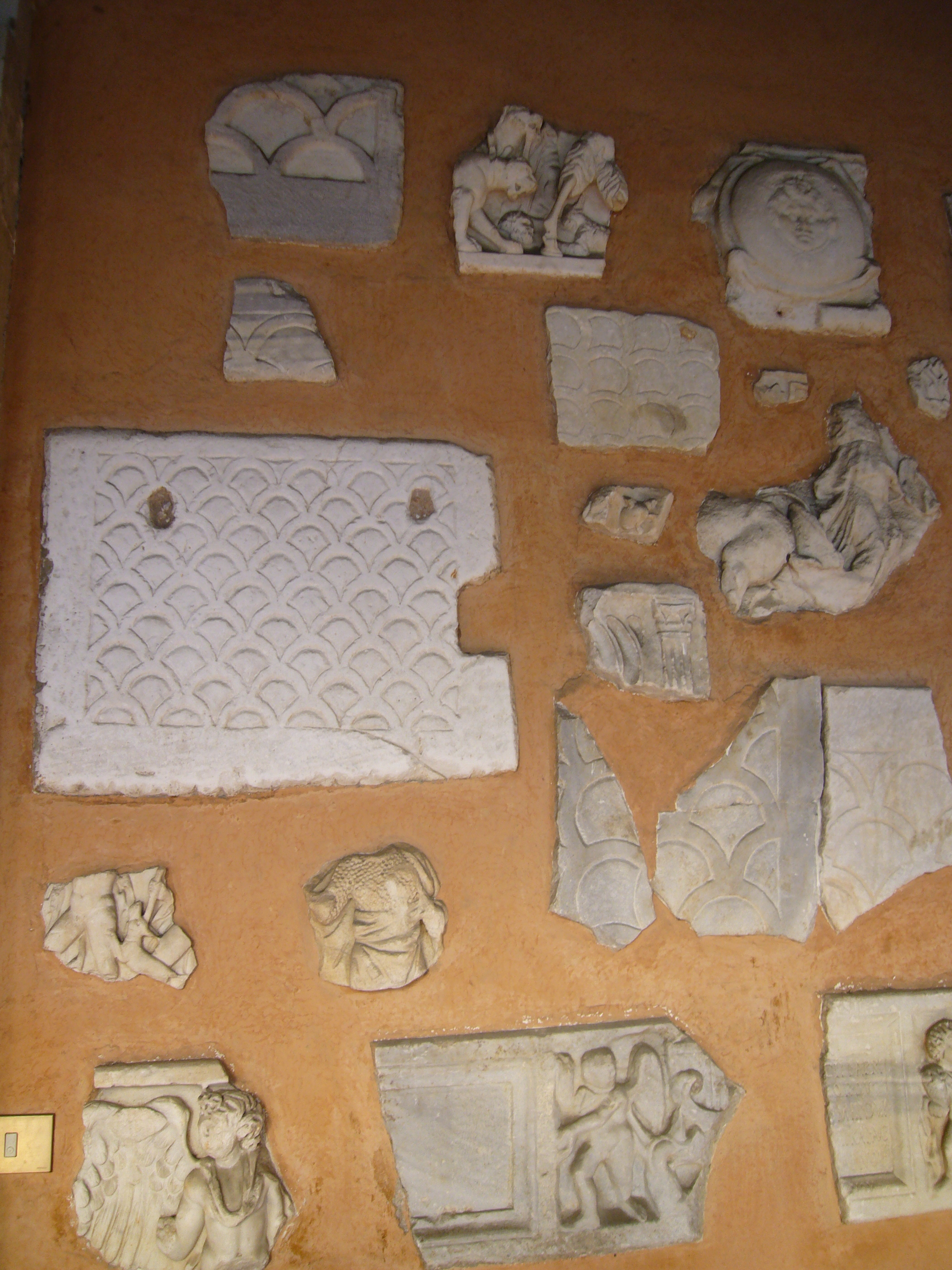 Roma, S. Paolo fuori le mura, lapidarium nel chiostro.